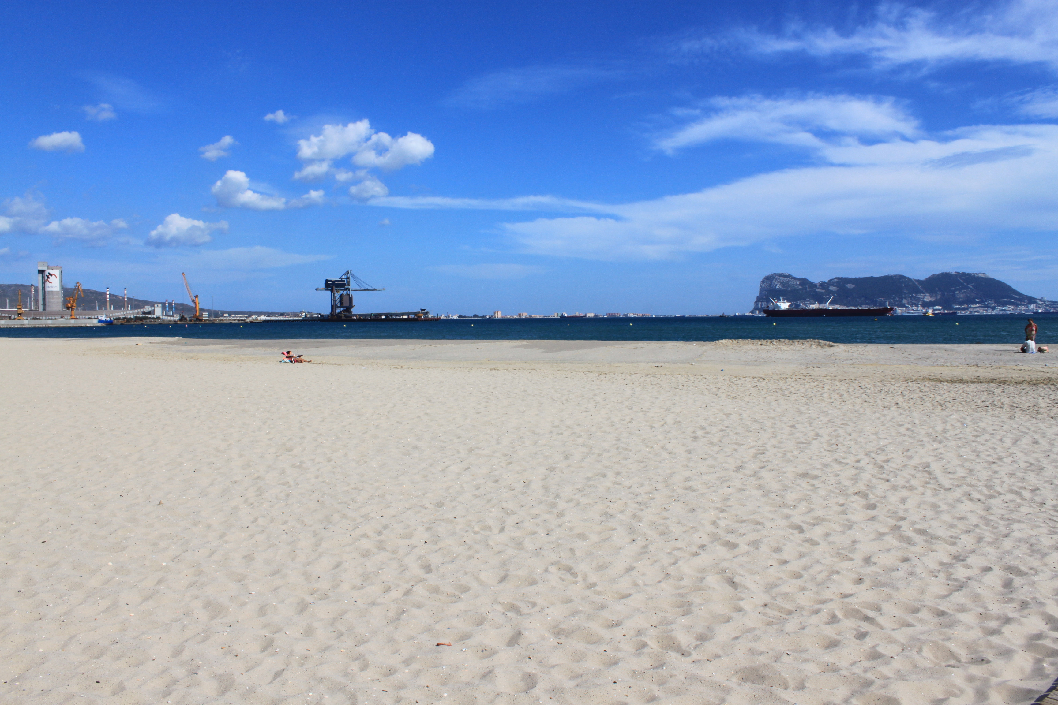 Playa de Palmones en la localidad de Los Barrios, Andalucía, España